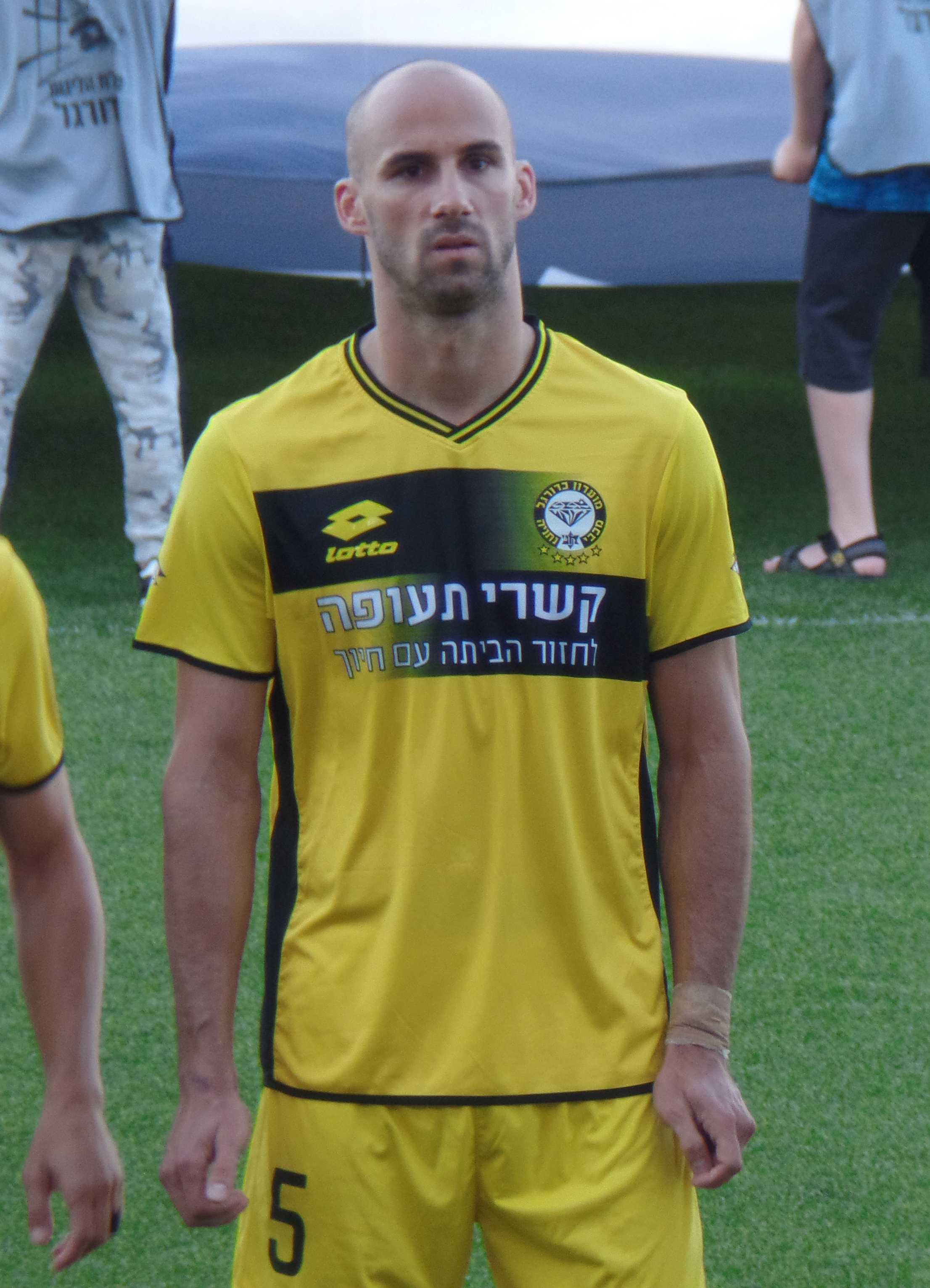 Branko Vrgoč